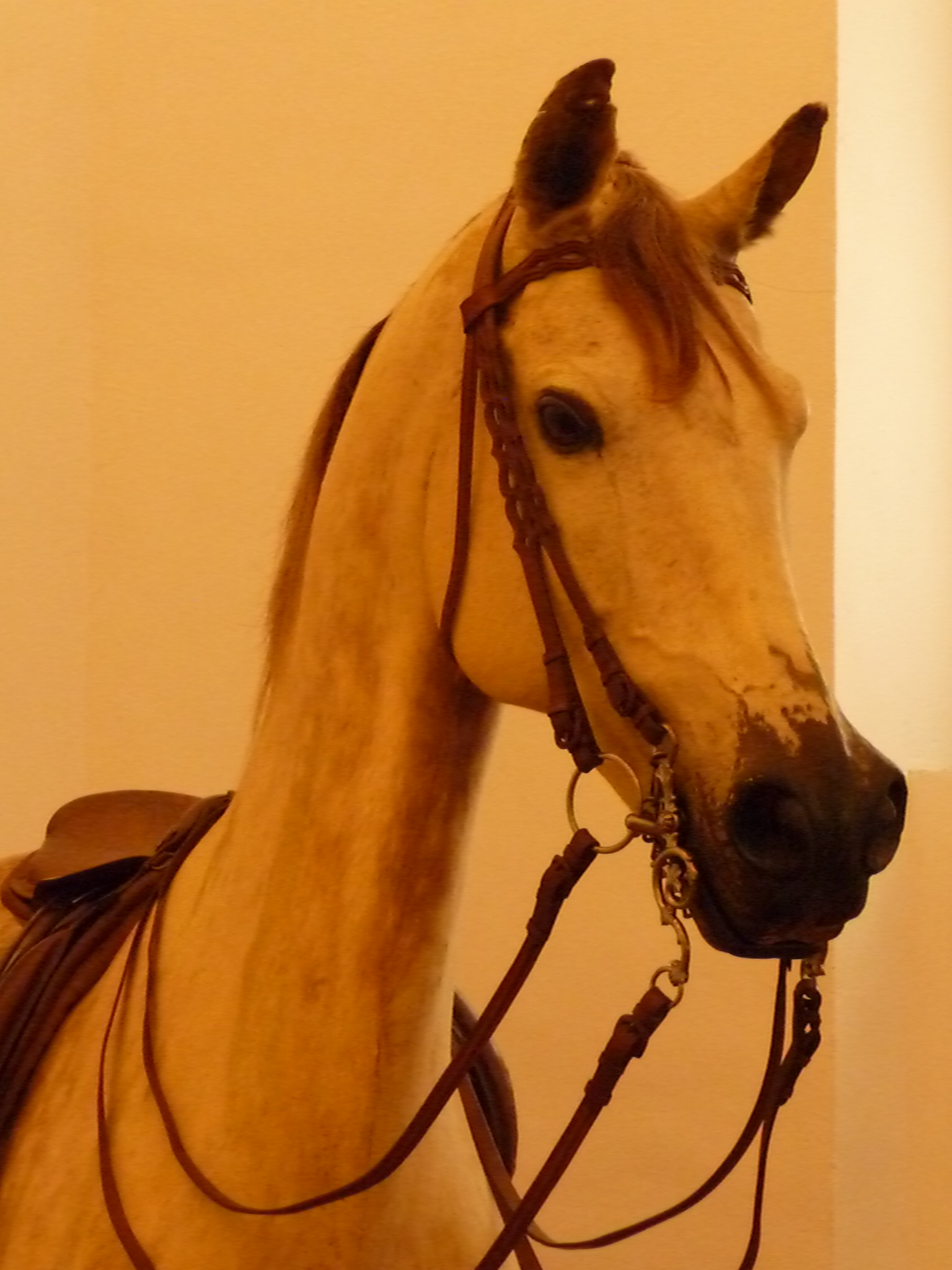 Der Schimmel Cosa Rara war eines der Lieblingspferde von König Ludwig II. von Bayern. Für die Nachwelt präpariert ziert er heute die ehemaligen Stallungen von Schloss Nymphenburg, in denen sich das Marstallmuseum befindet